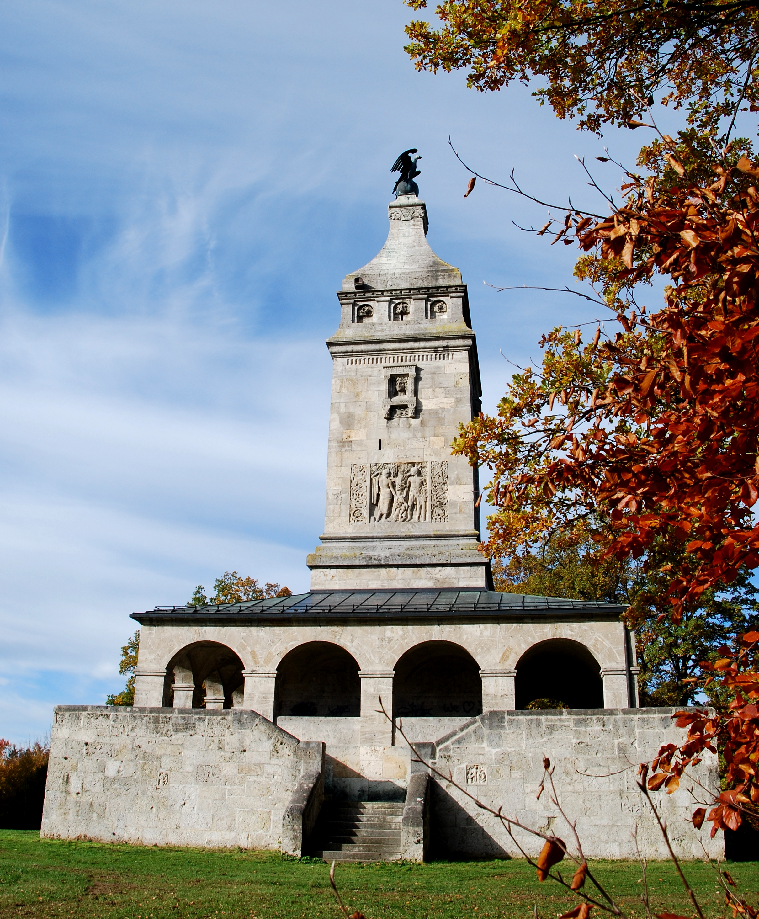 Berg am Starnberger See, OT Assenhausen, Bismarckturm. Monumentale, weithin sichtbare Denkmalanlage. Loggienartige Wandelhalle mit Freitreppen aus Tuff- und Kalkstein, Turmbau mit einer von einem Adler bekrönten Kugel. 1896-1899 von Architekt Theodor Fischer erbaut.